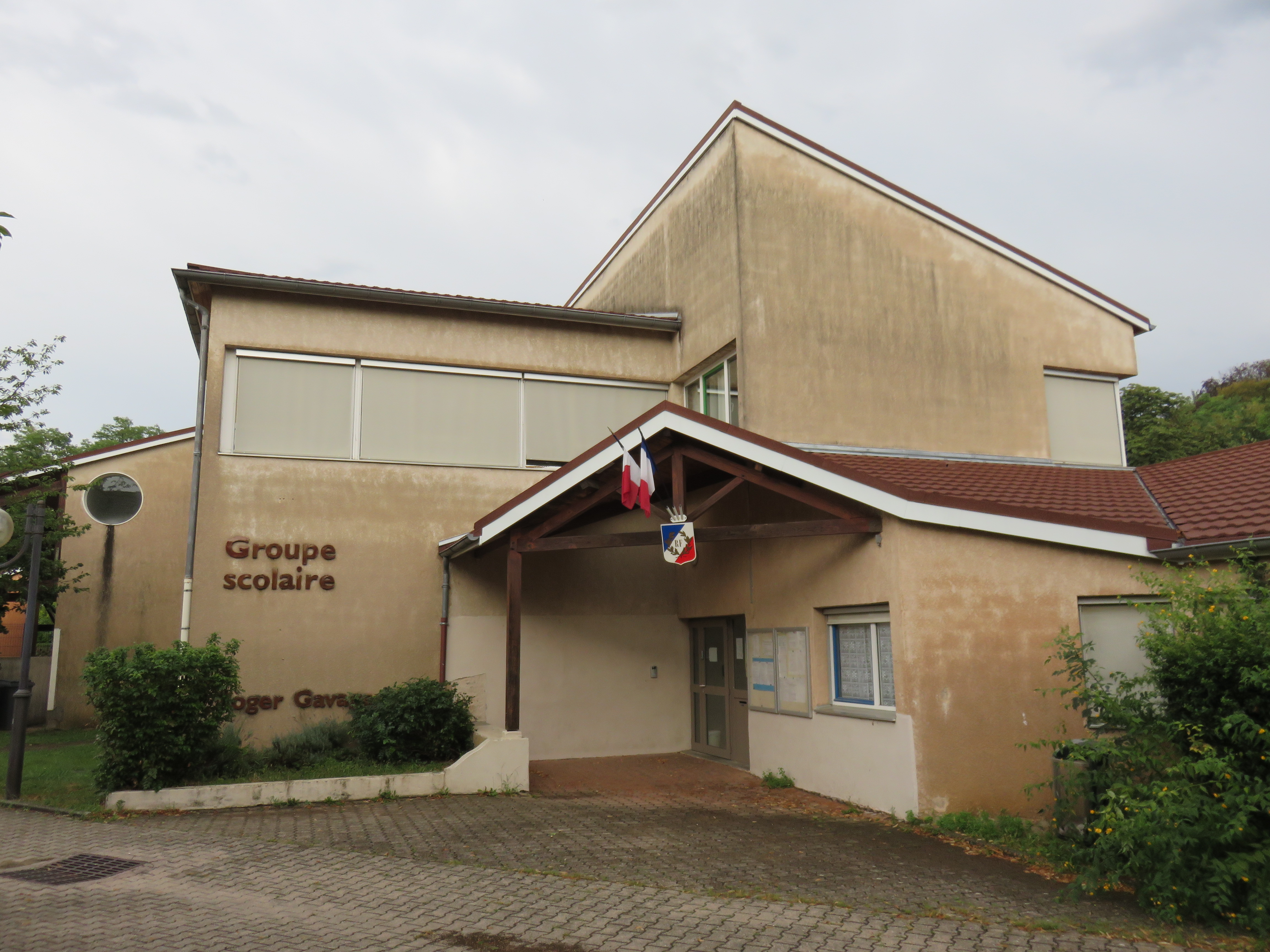 Groupe scolaire Roger Gavage à Fontaines-Saint-Martin (Rhône, France).